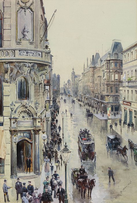 Blick von der Taubenstraße auf die Friedrichstraße in Berlin. Aquarell. 27,9 x 33 cm.